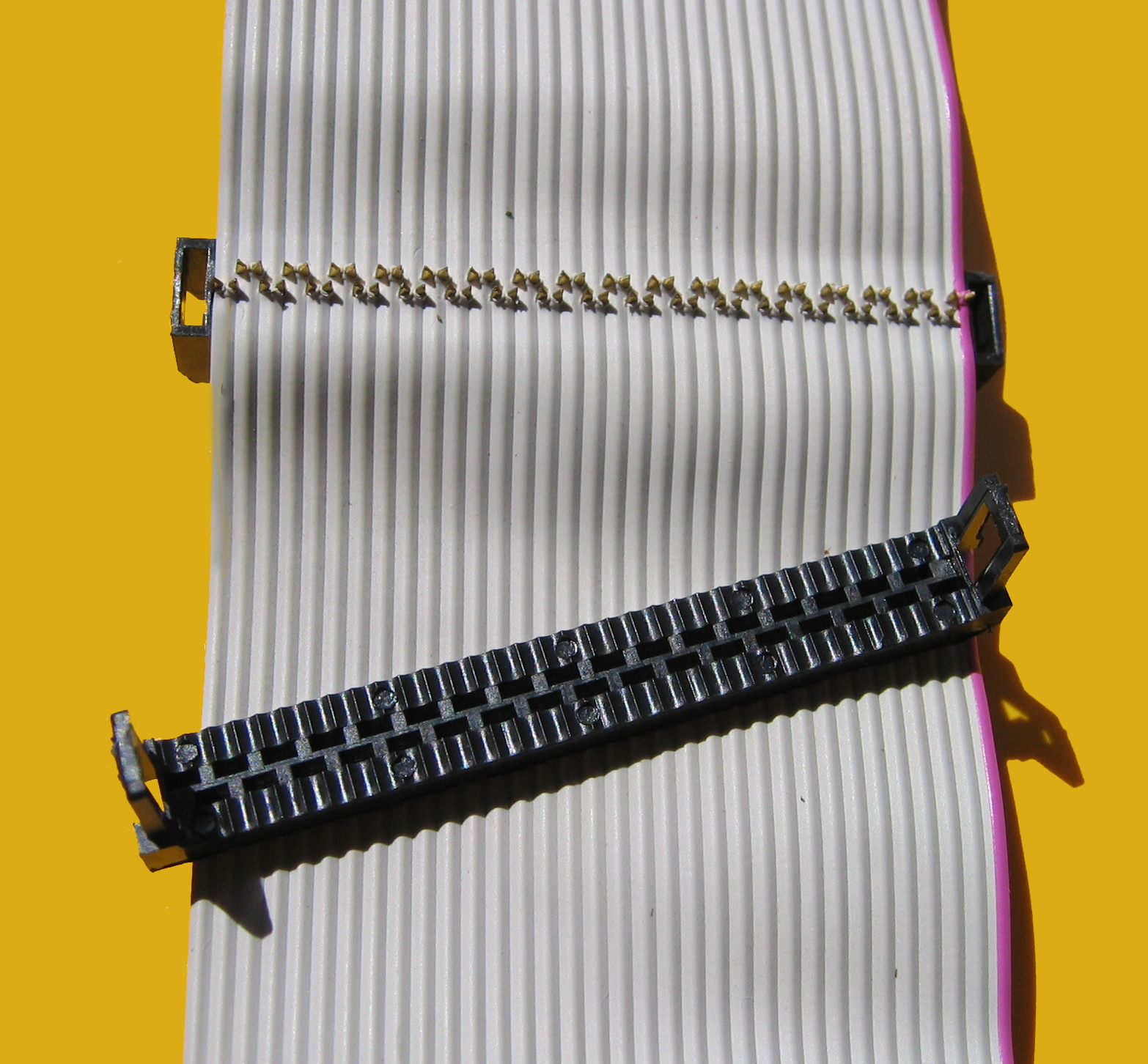 FDD 34 PIN Scheidklemmen